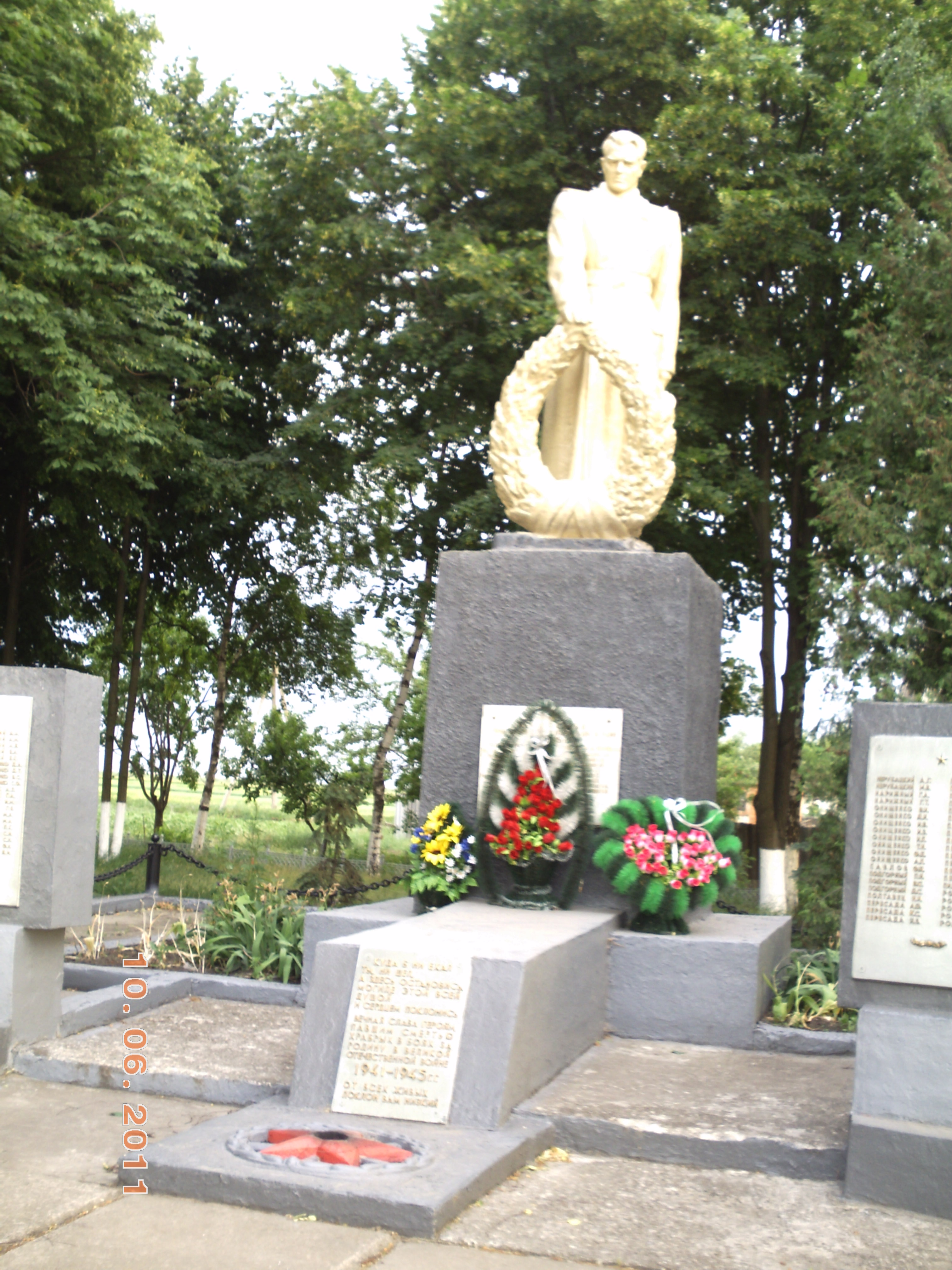 Пам'ятник воїнам-односельчанам., Баранове